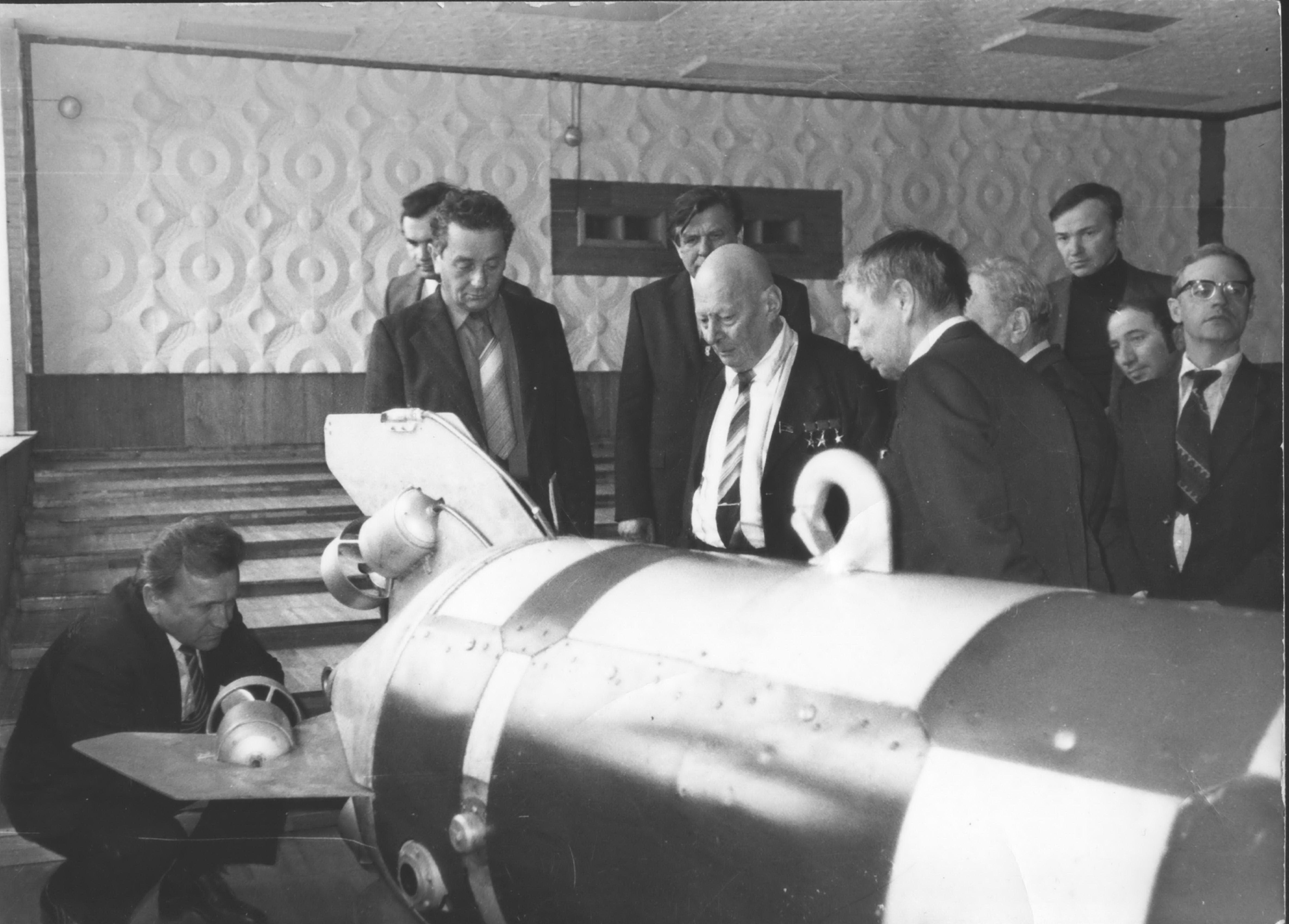 Посещение ИАПУ ДВО РАН Президентом АН СССР академиком Александровым А.П.